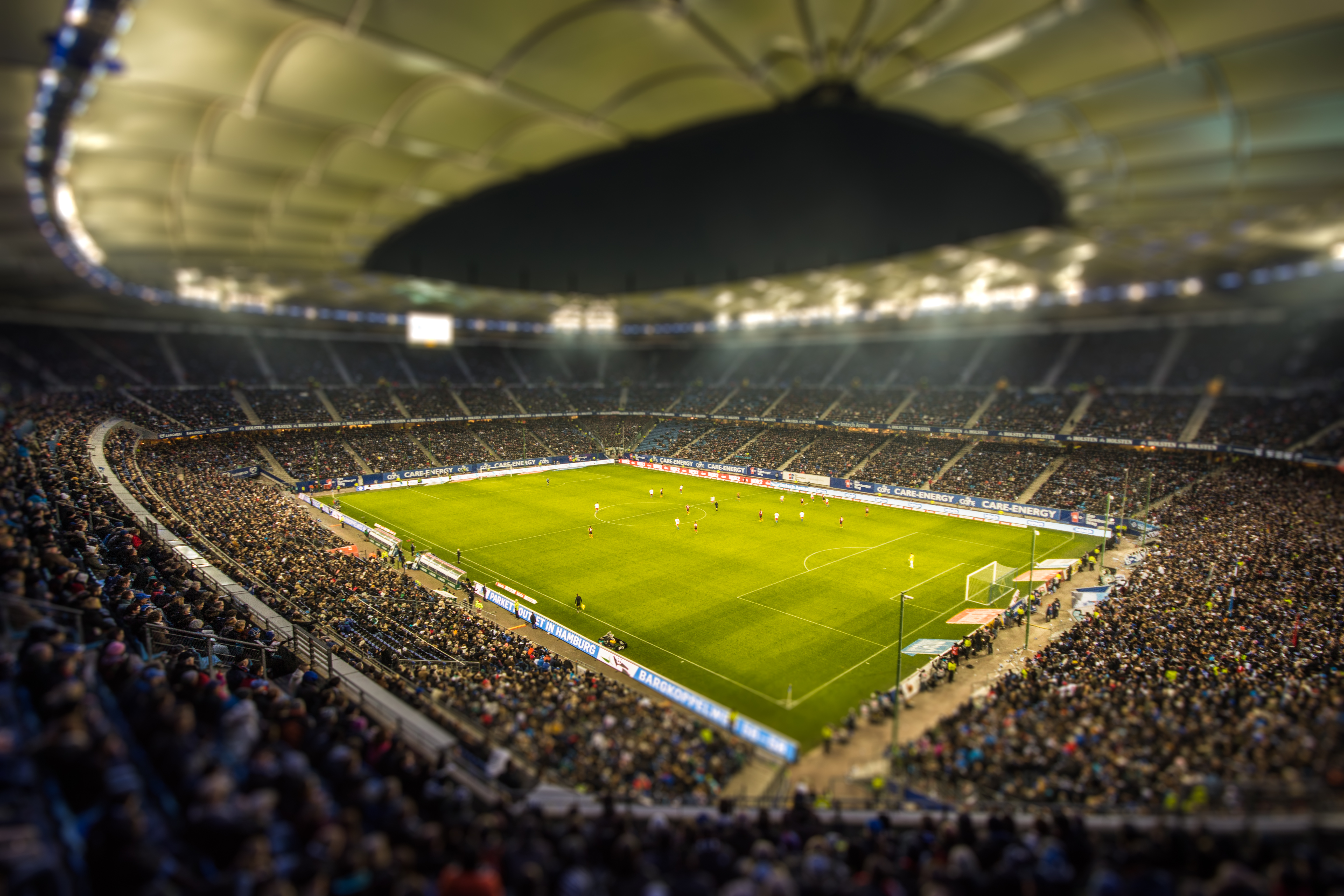 Das Volksparkstadion, Hamburg, seit 2010 offiziell imtech arena